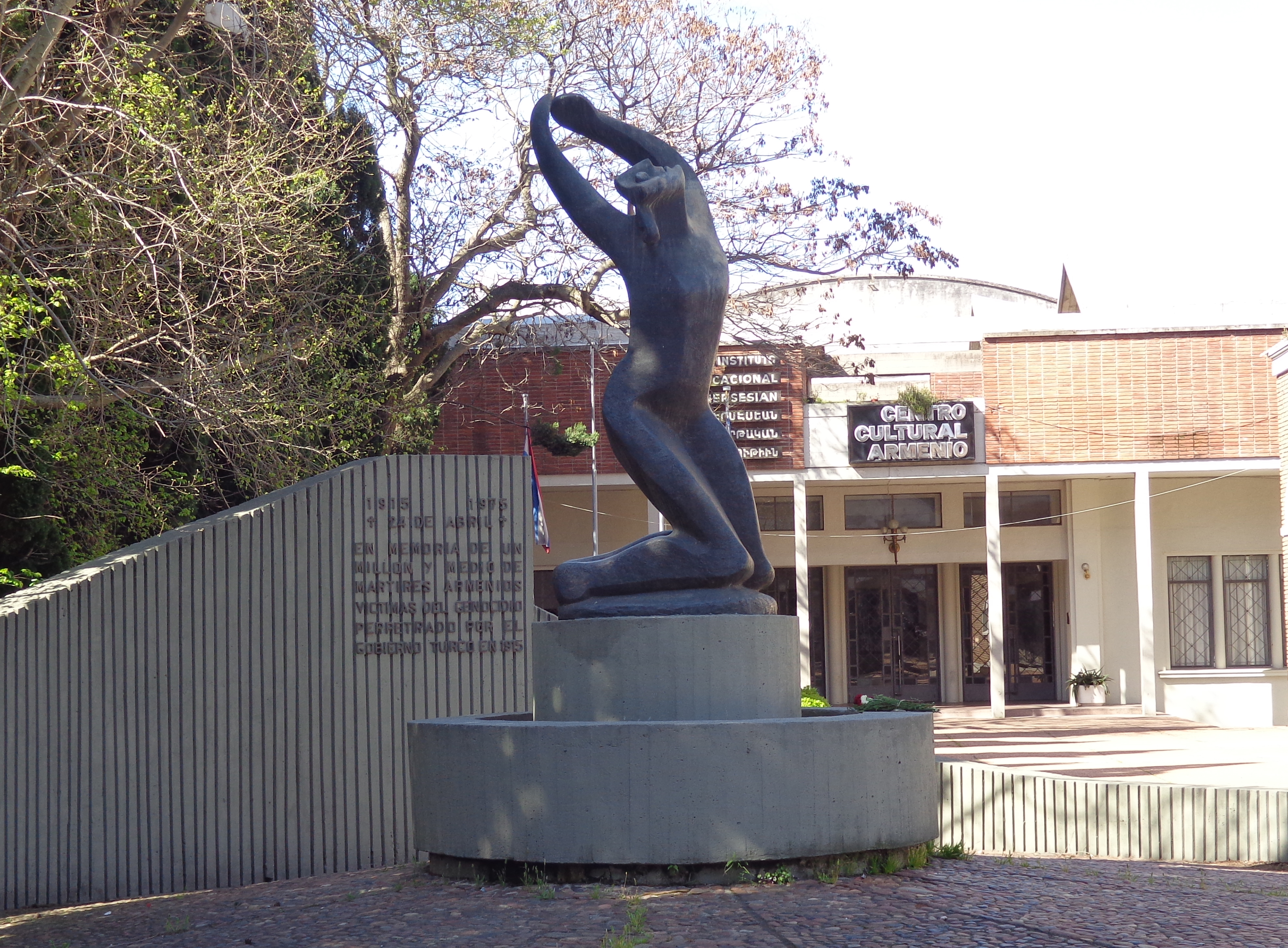 Martires armenios. Ubicada en el departamento de Montevideo